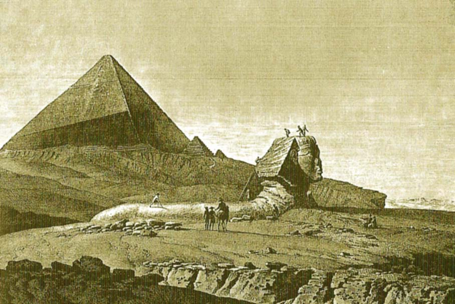 Mise en évidence du phénomène de concavité des faces de la pyramide de Khéops à Gizeh